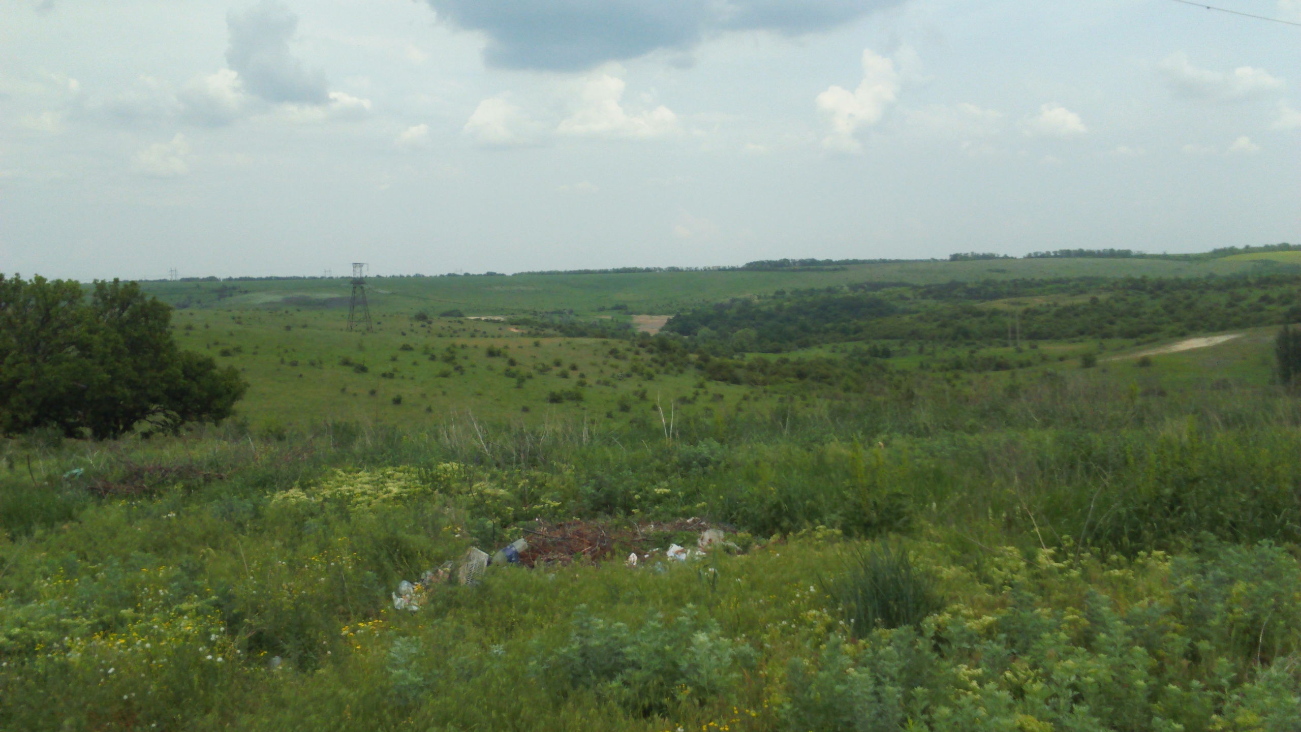 На схід Никанорівка - заповідне урочище «Гектовая балка» (40 га) з прохолодними ставками і величезною кількістю півонії-воронця.